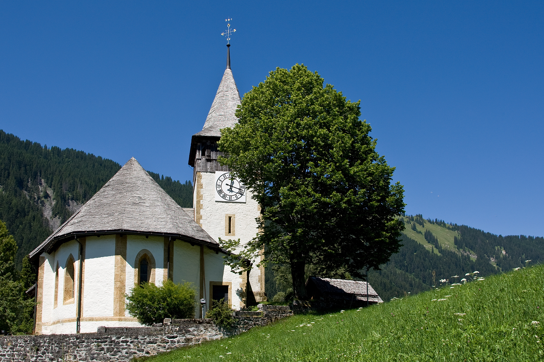 Reformierte Kirche in Lauenen (BE)